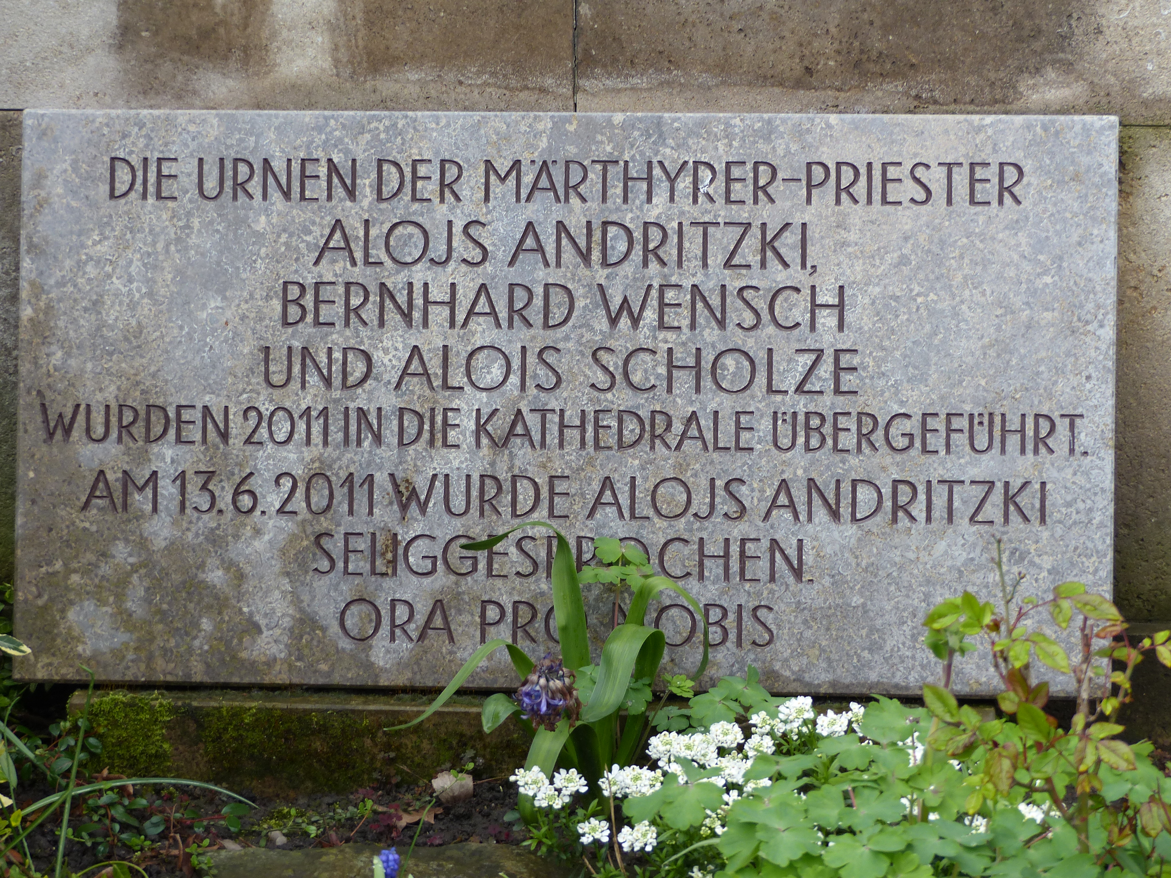 Priestergruft auf dem Alten Katholischen Friedhof, Friedrichstraße 54, Dresden